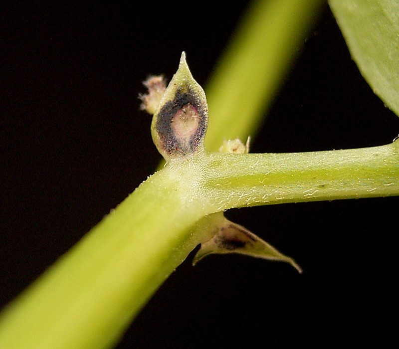 Vicia sepium: estípulas.